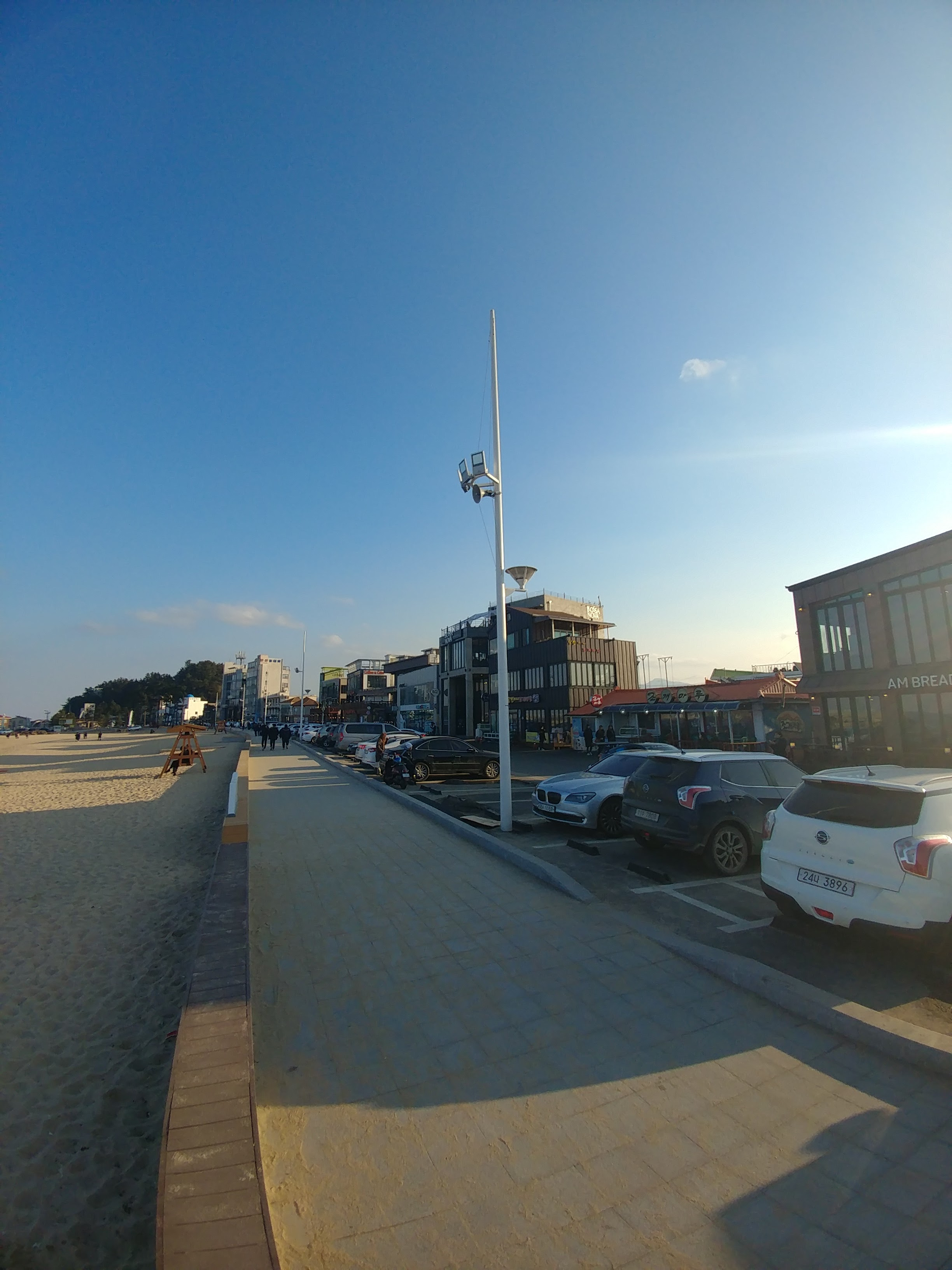 강릉커피거리의 한 모습